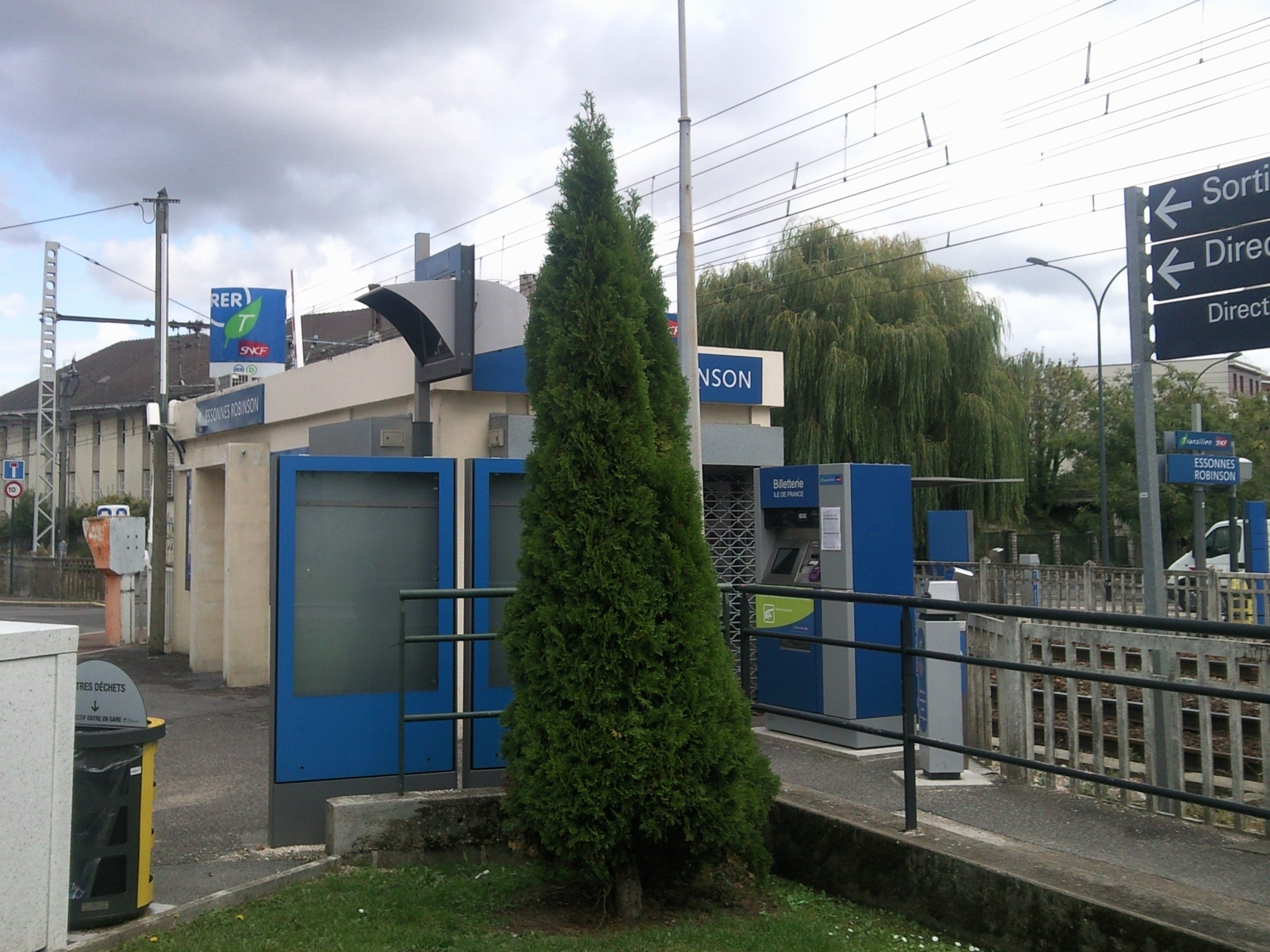 Bâtiment de la Gare de Essonnes Robinson